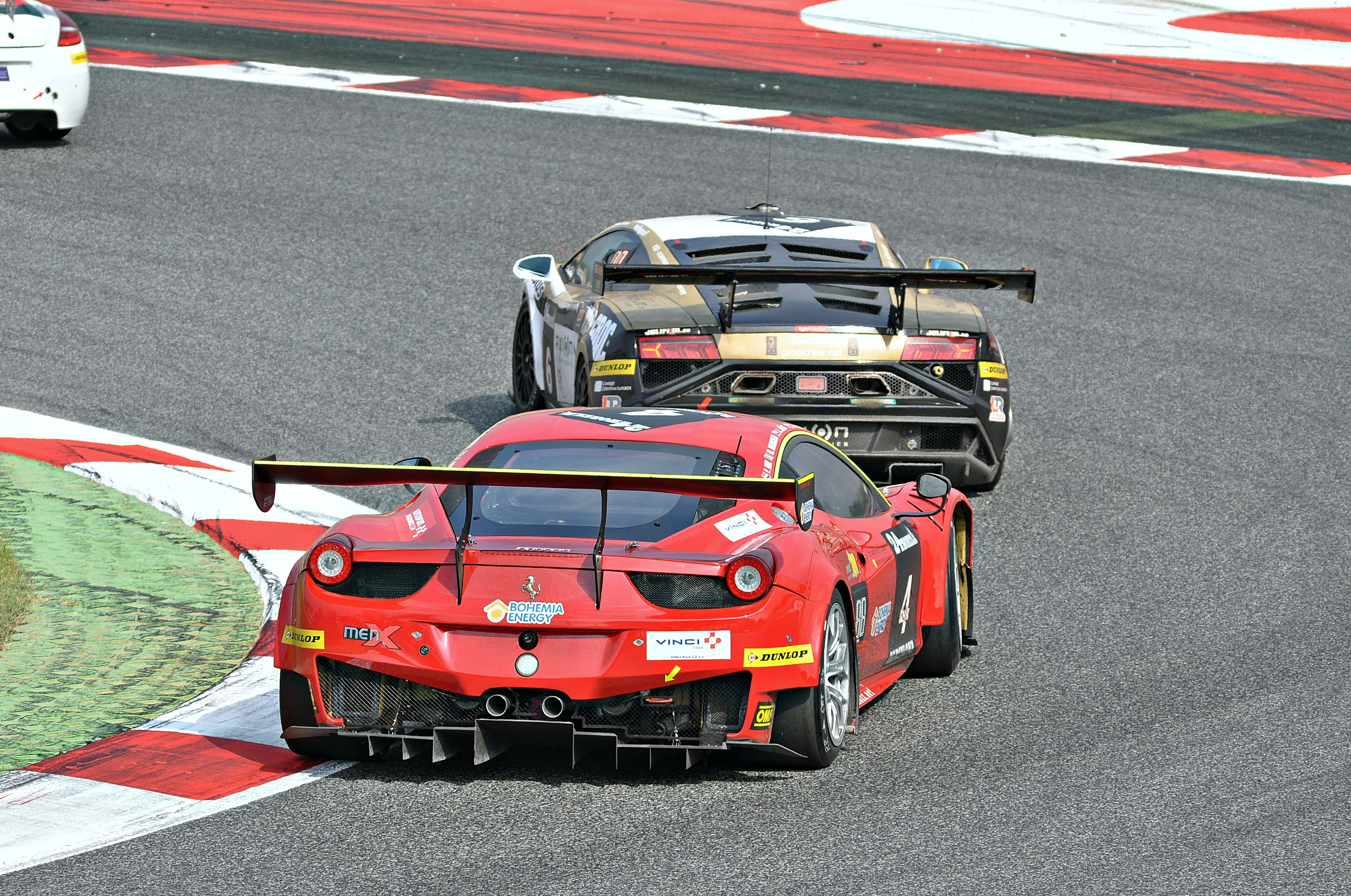 ferrari 458 en las 24 horas de Barcelona de automovilsmo-2014